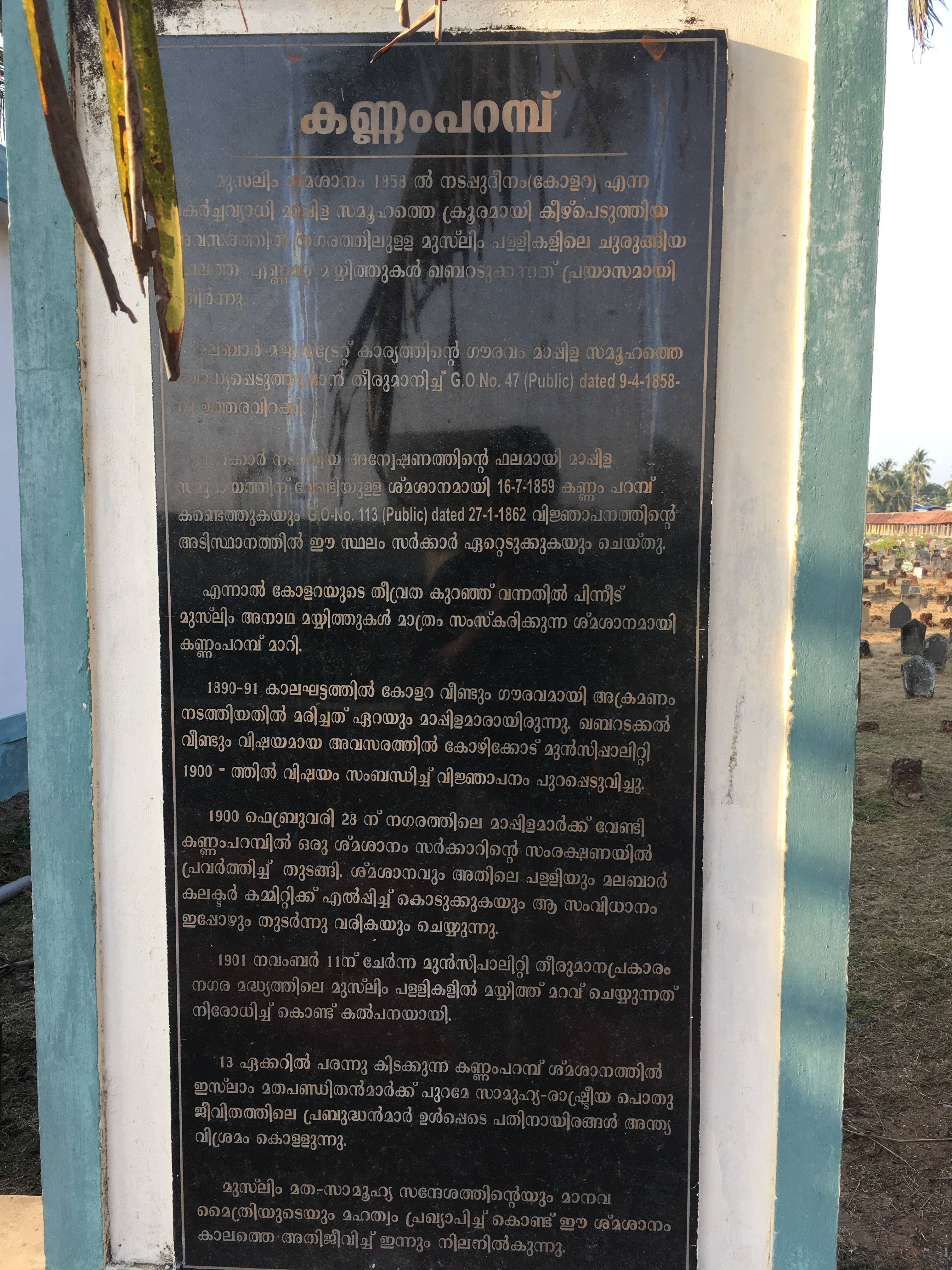 കണ്ണംപറമ്പ് ശ്മശാനത്തിന്റെ കവാടത്തിൽ സമീപം സ്ഥാപിച്ചിട്ടുള്ള ചരിത്രം രേഖപ്പെടുത്തിയ ഫലകം